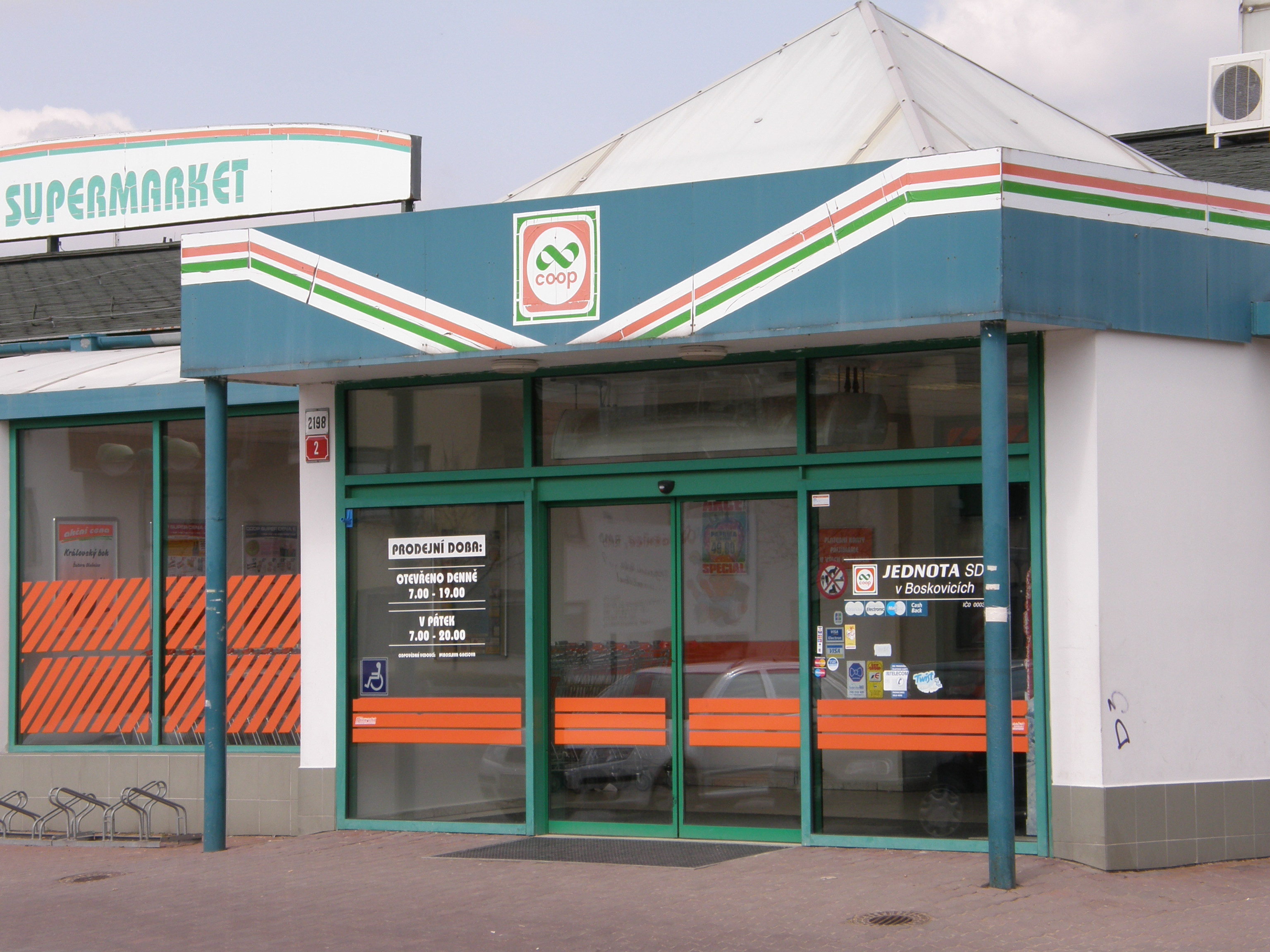 Coop Supermarket (Boskovice)